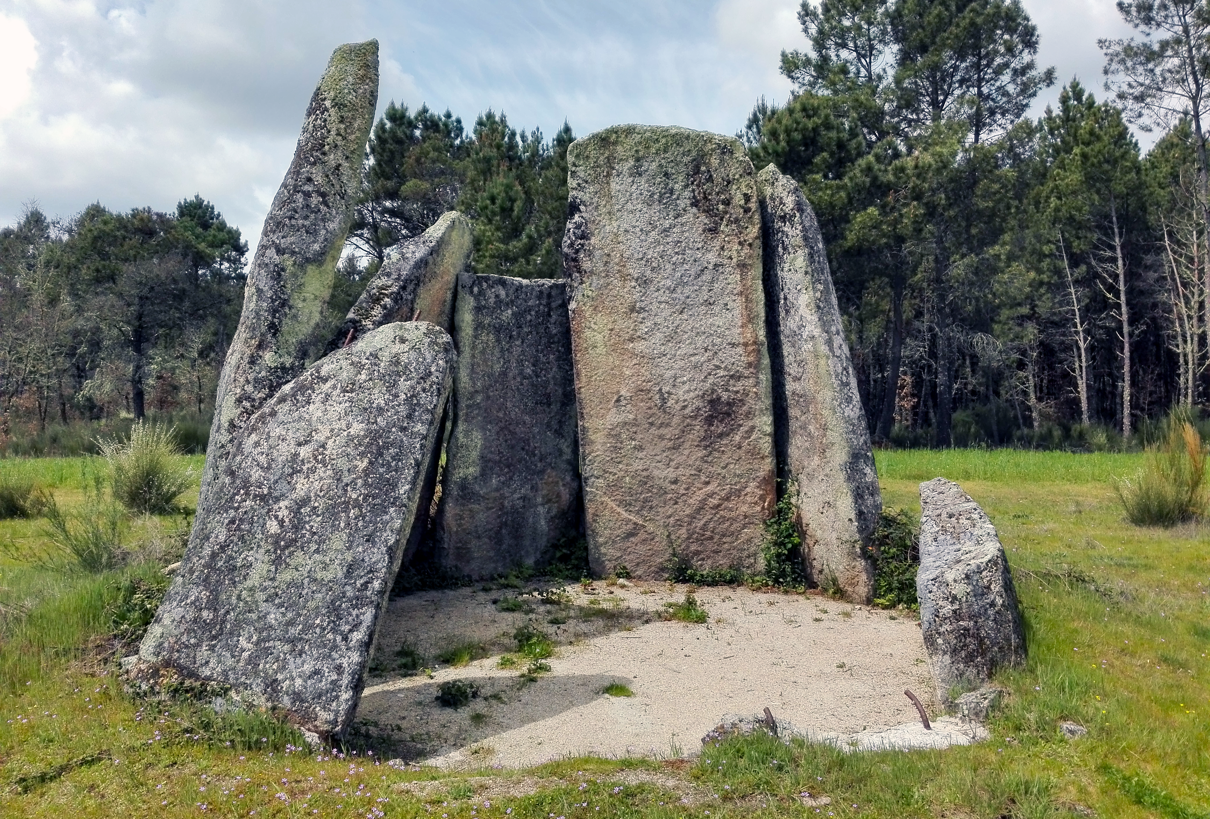 Vista do Dólmen I de Carapito.